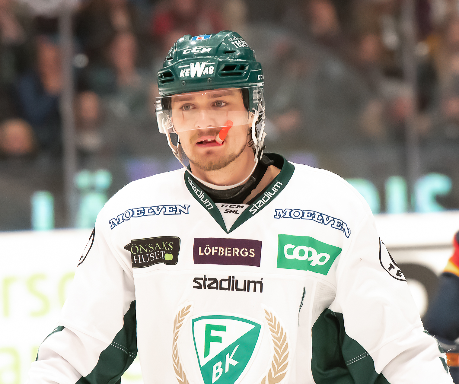 Djurgården-Färjestad 20190129